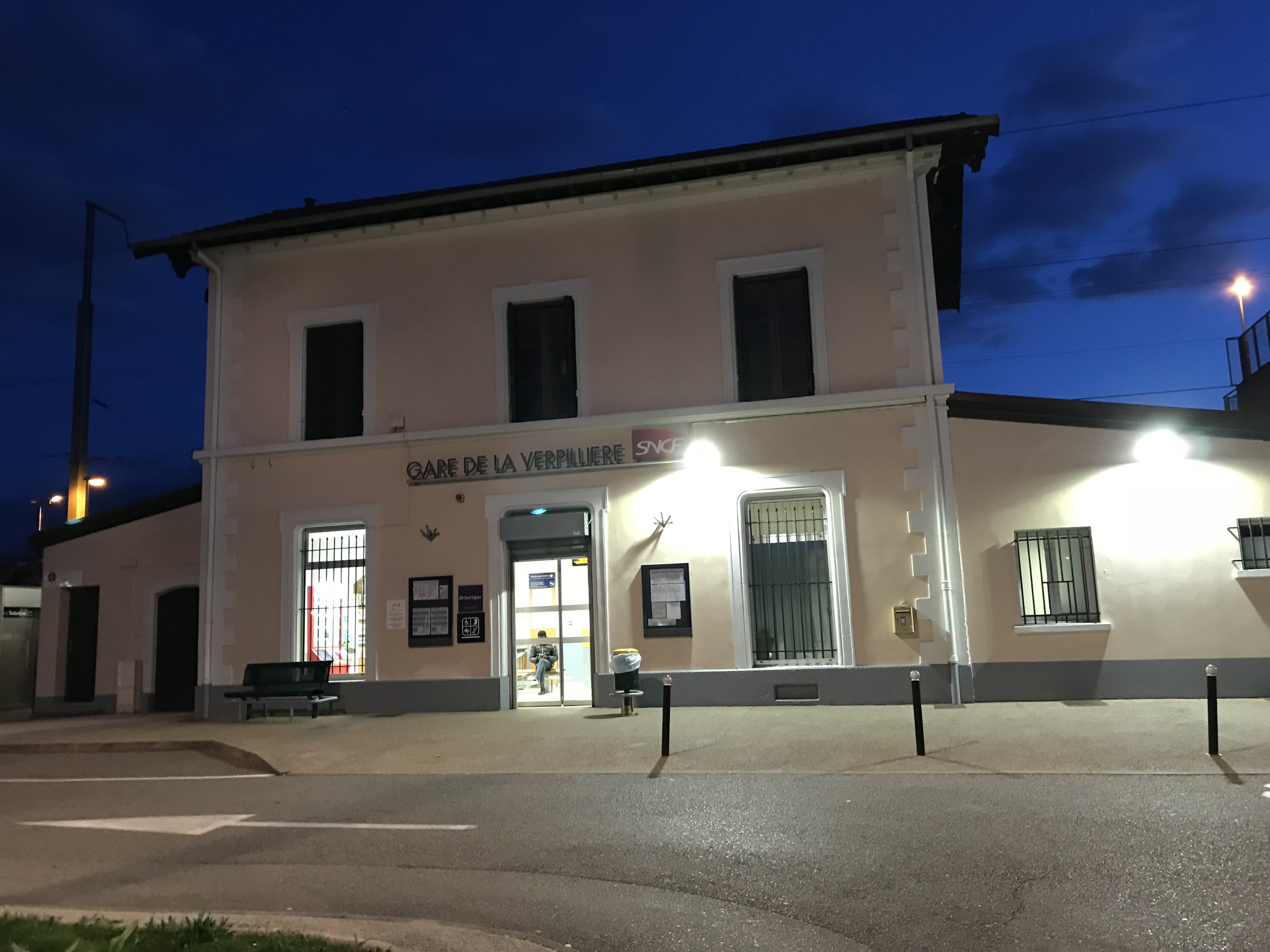 La gare de La Verpillière en 2018